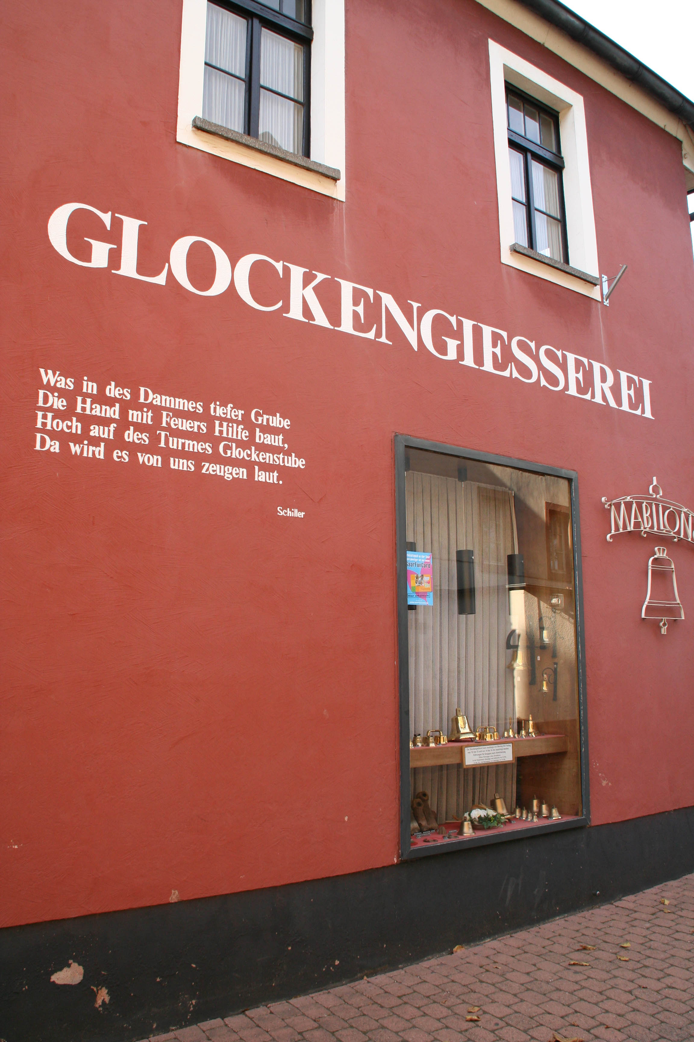 SAA KLA 101.